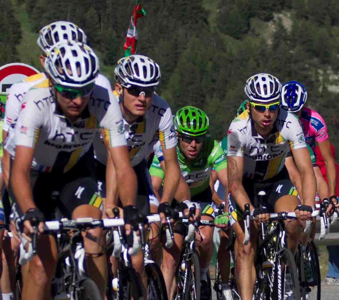 lautaret 111 cavendish met ploegmaats